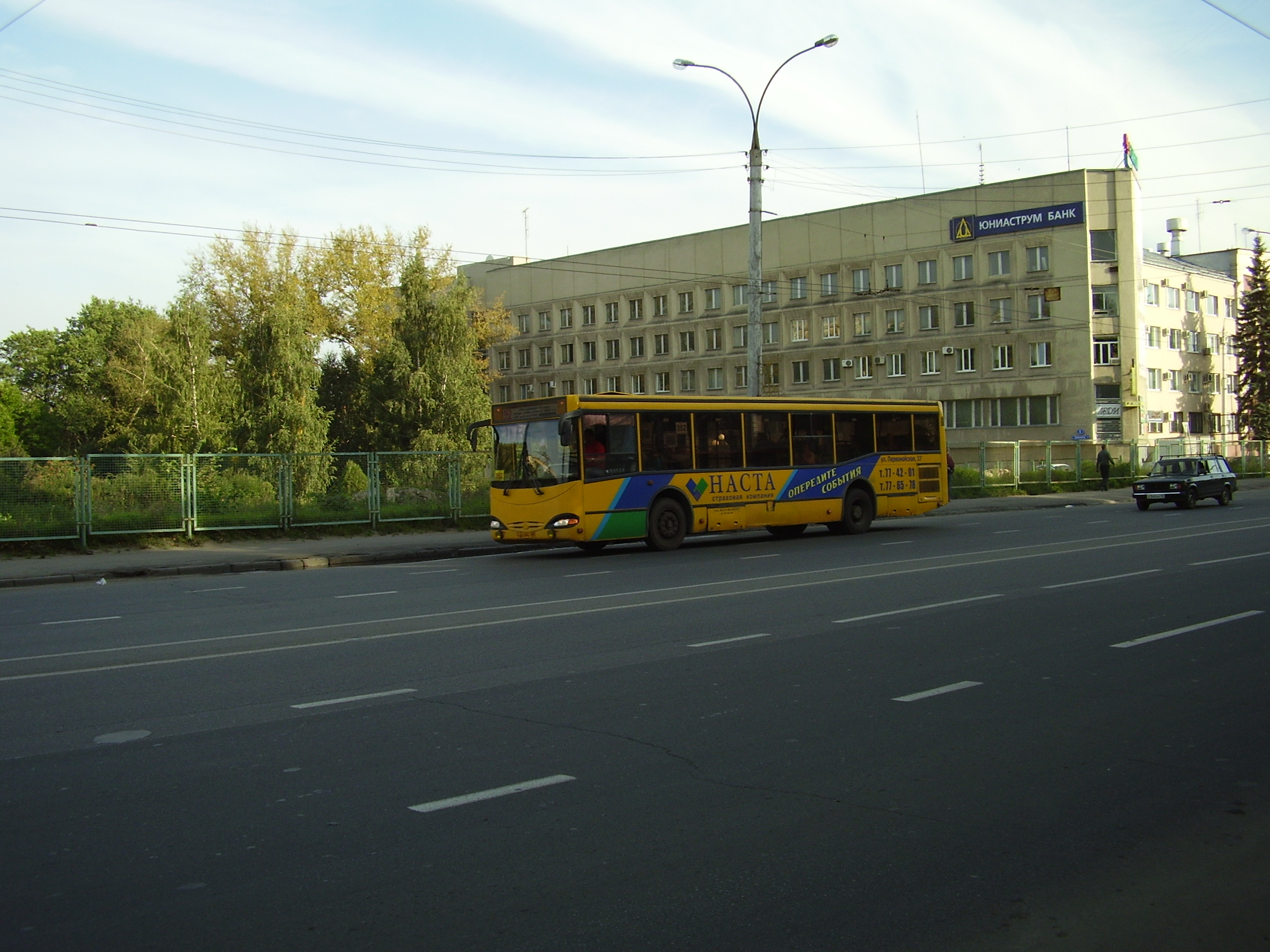 Городской автобус МАРЗ в Липецке